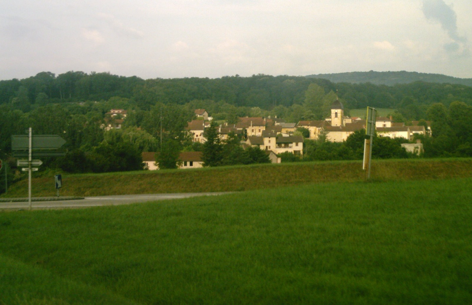 Vue générale de la commune de Bohas (Ain, FRANCE)